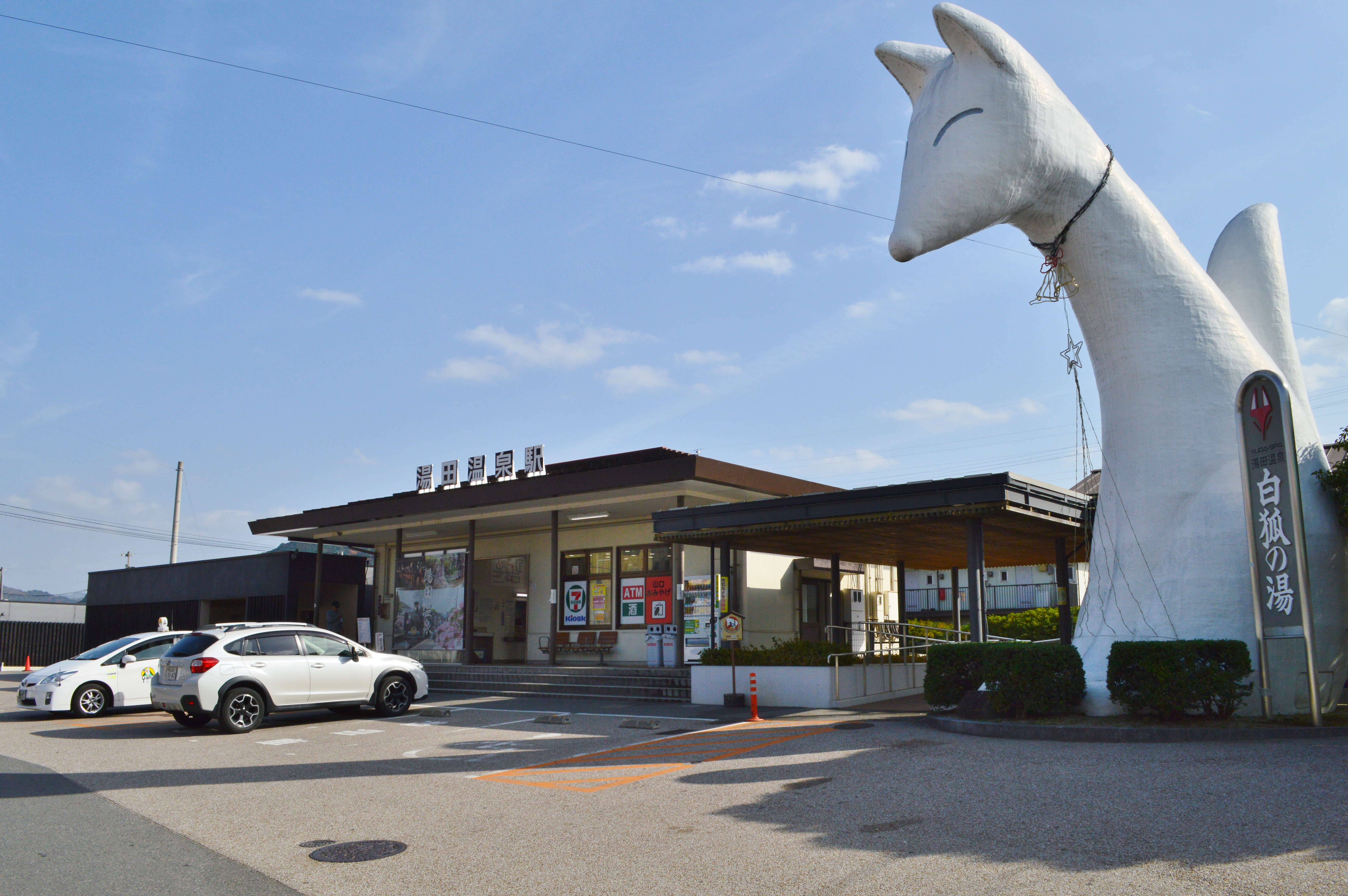 湯田温泉駅 駅舎と白狐像